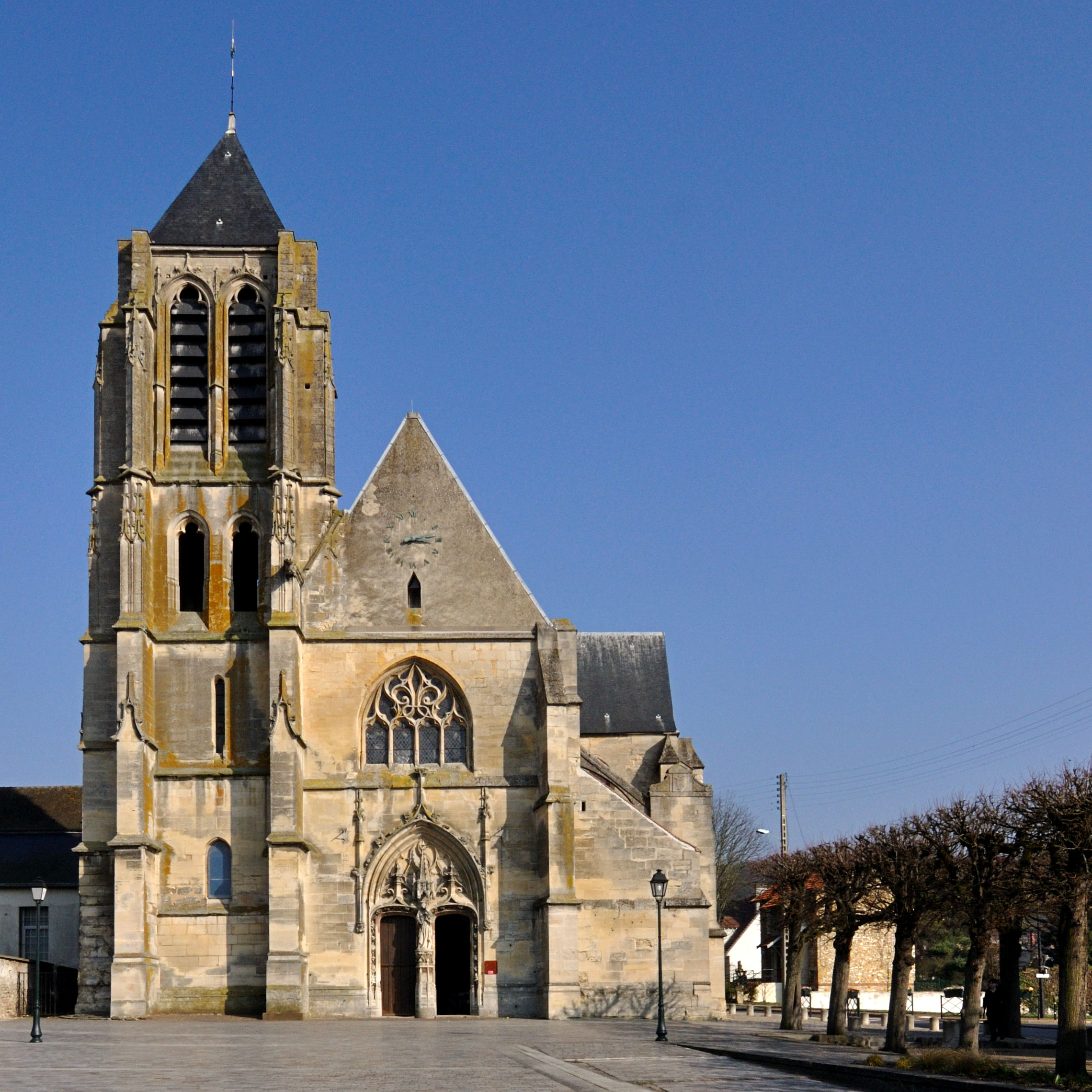 église Notre-Dame de Bessancourt (Val d'Oise)